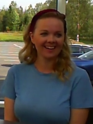 Katri Kulmuni